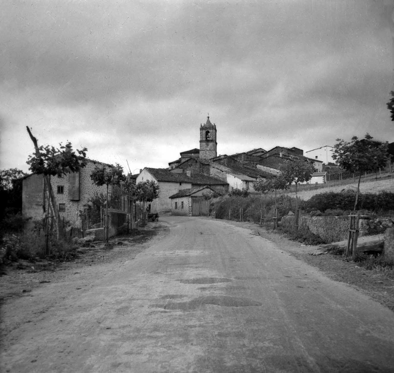 Santikurutze Kanpezu 1956an